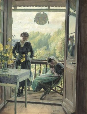 Gespräch auf dem Balkon (Der lange Bräutigam). Gouache on cardboard. 51 x 39 cm. Signed